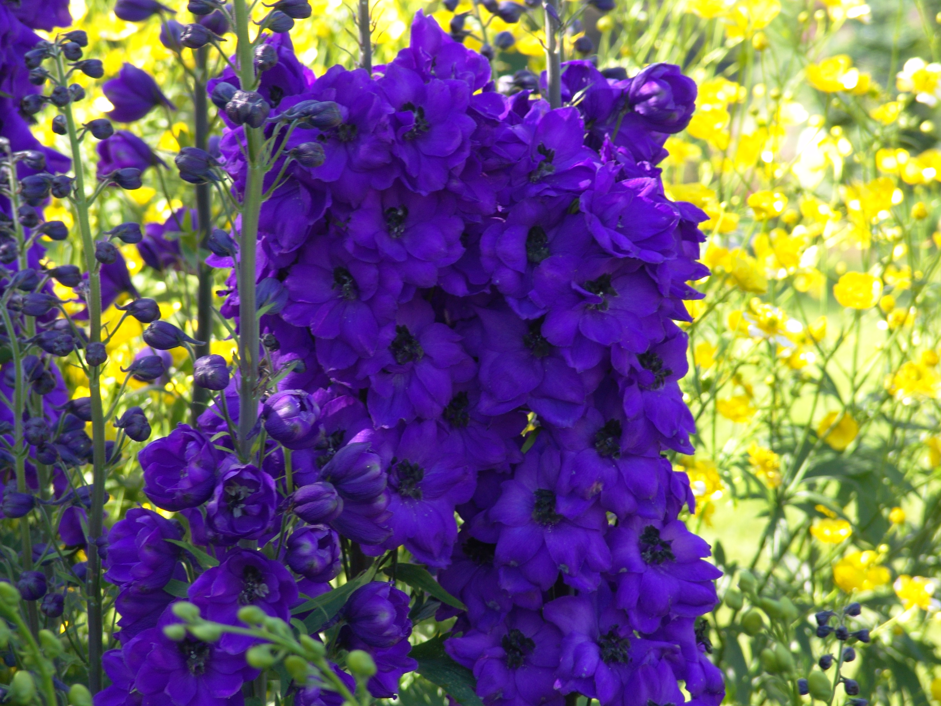 Delphinium spec., Island, Botanischer Garten Akureyri.